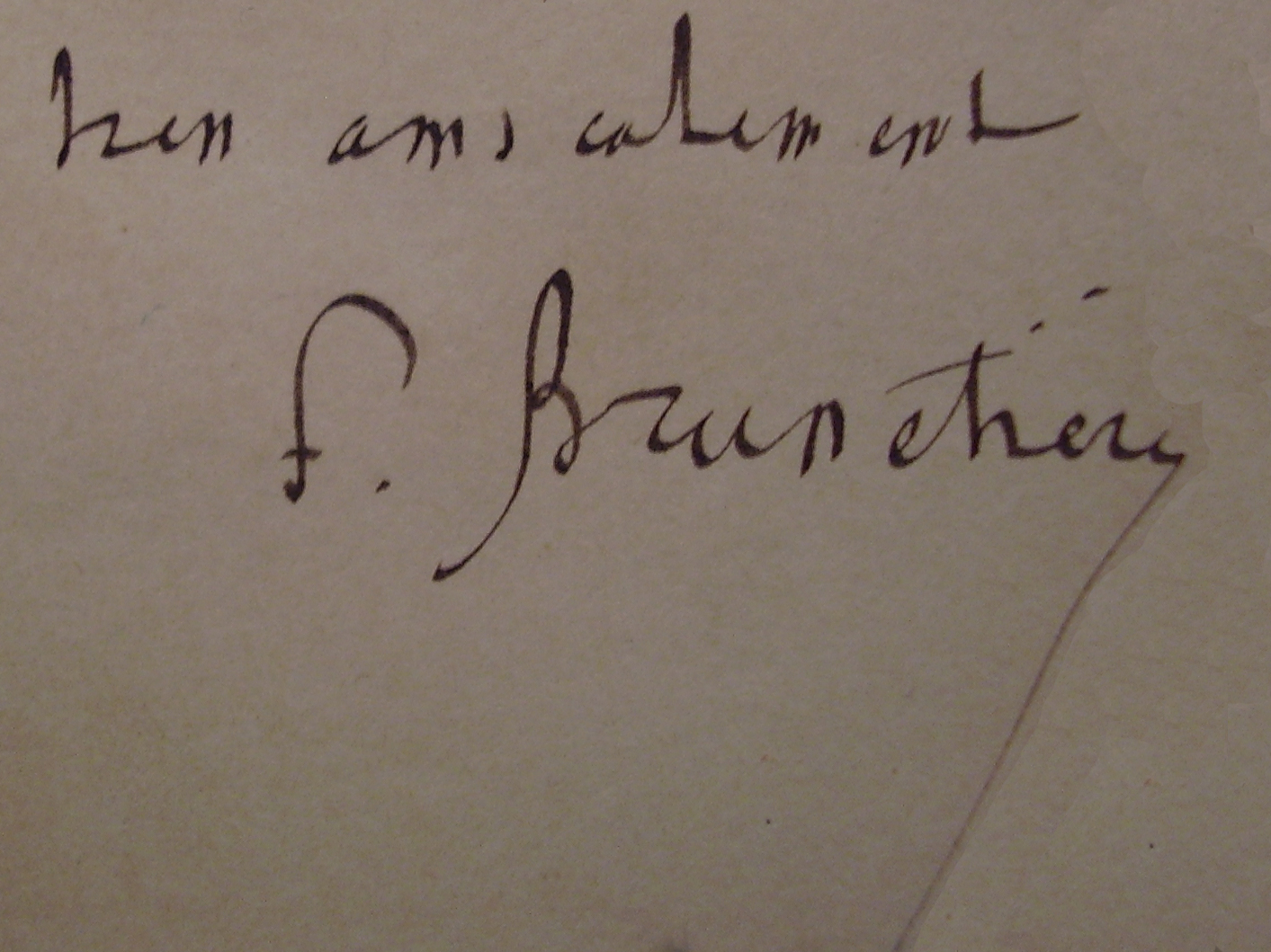 Envoi autographe de Ferdinand Brunetière